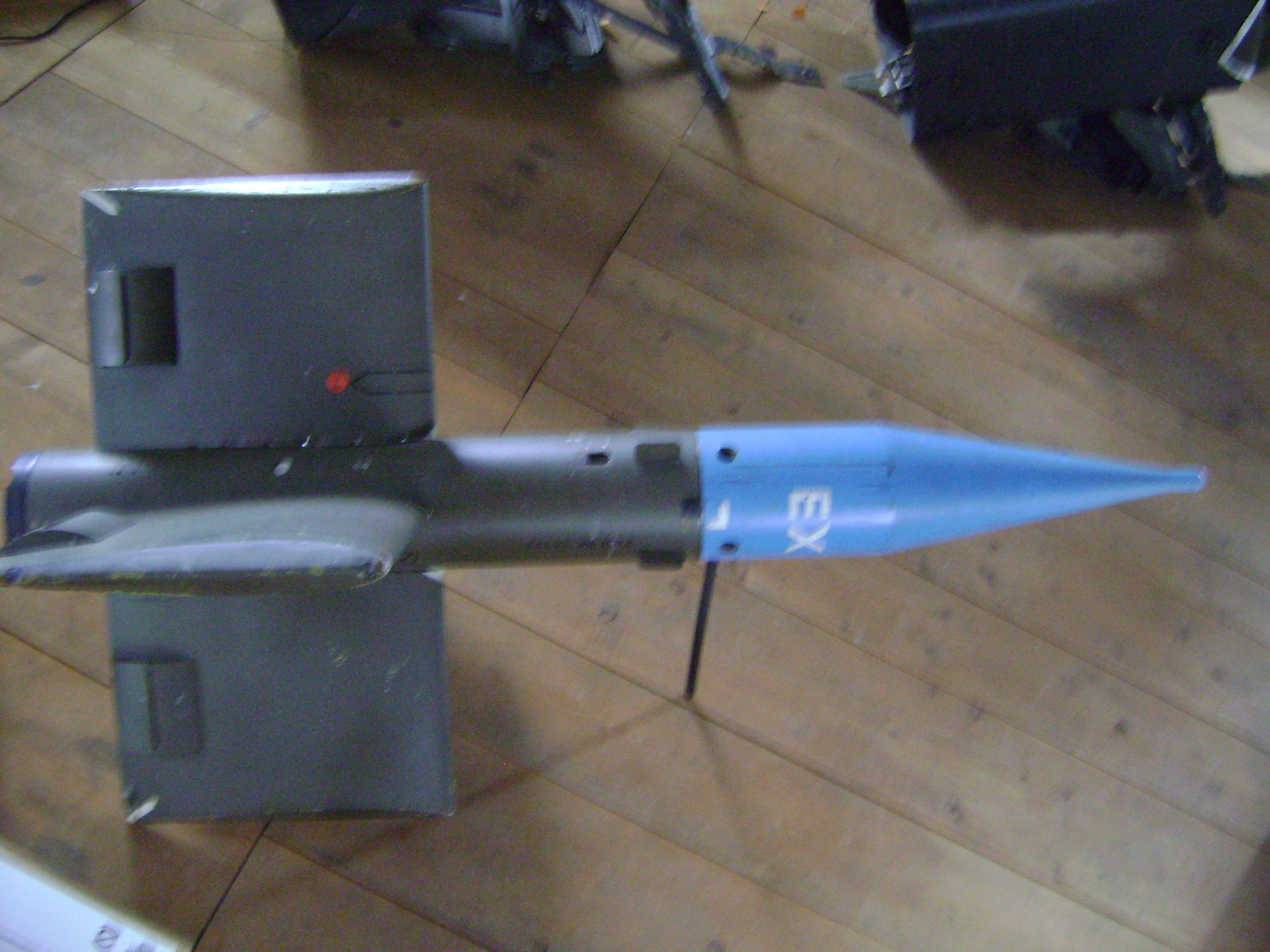 Mosquito Anti Tank missile Oerlikon Contraves